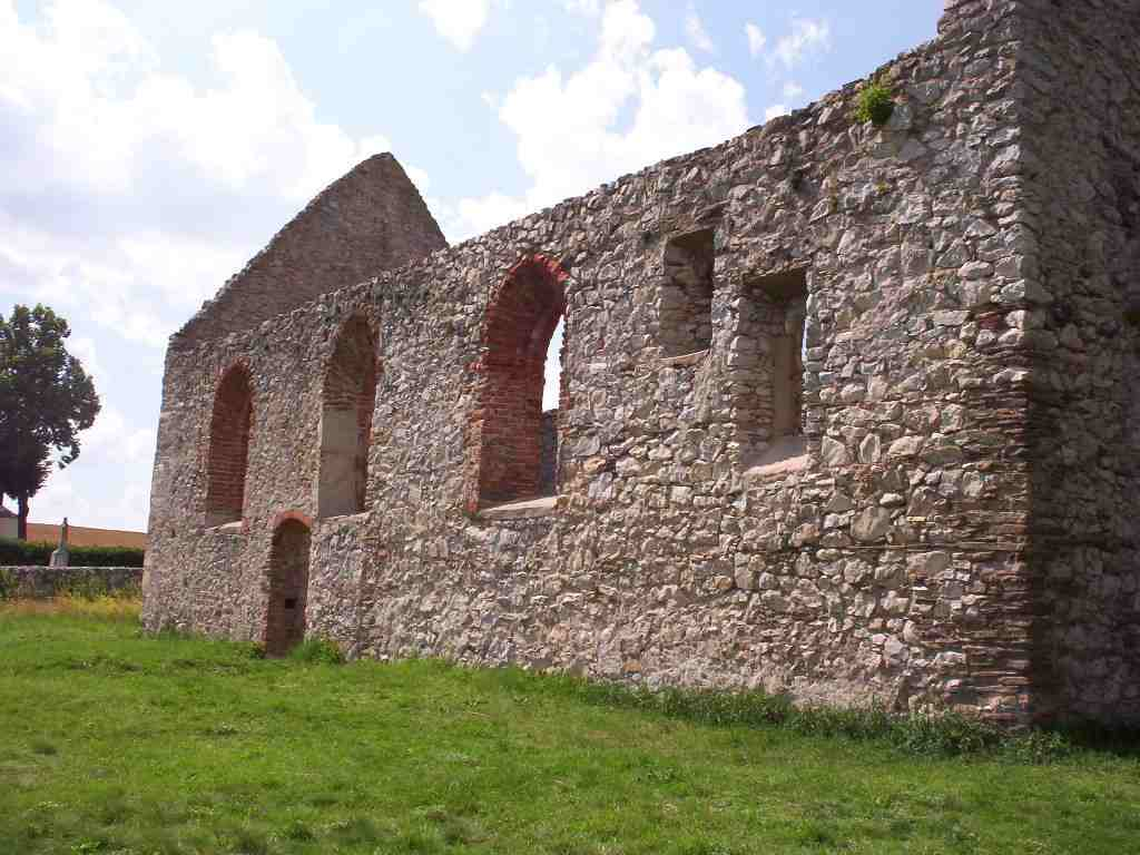 Románsky kostolík v Haluziciach, slúžil do začiatku 19. storočia